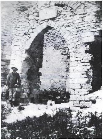 Vecchia foto di Porta Regina